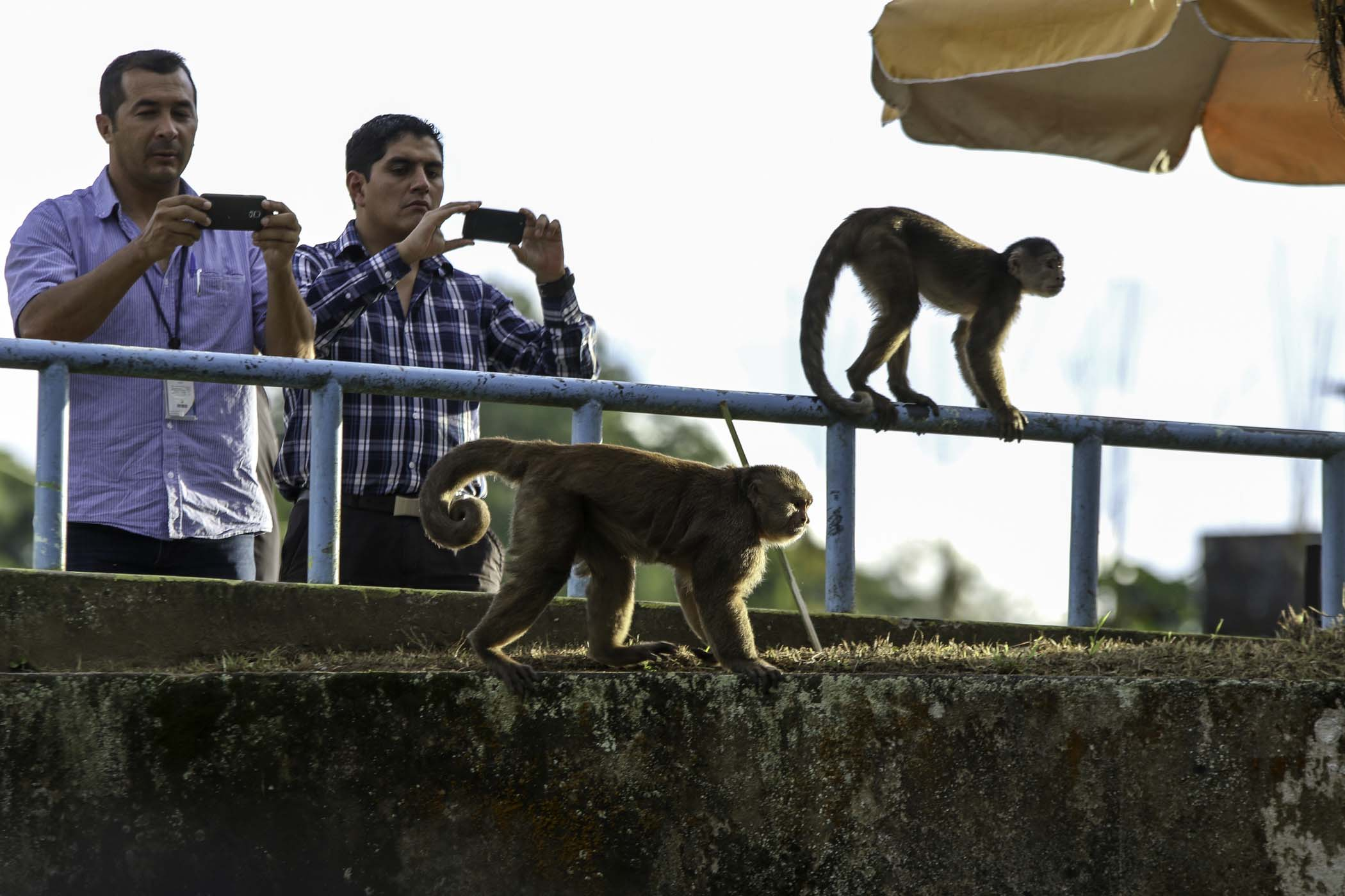 MISAHUALLI